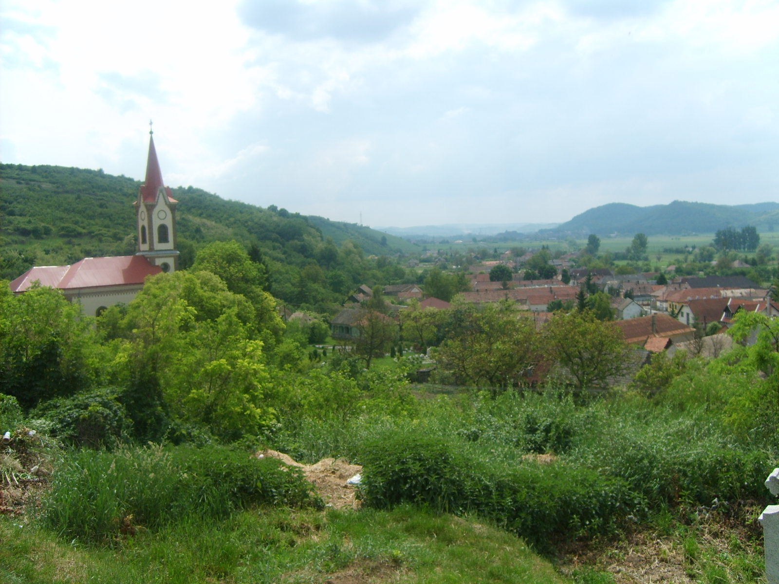 Sajónémeti látképe a temetőből nézve.